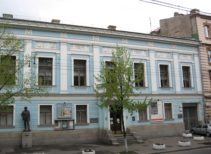 Russian art museum in Kiev